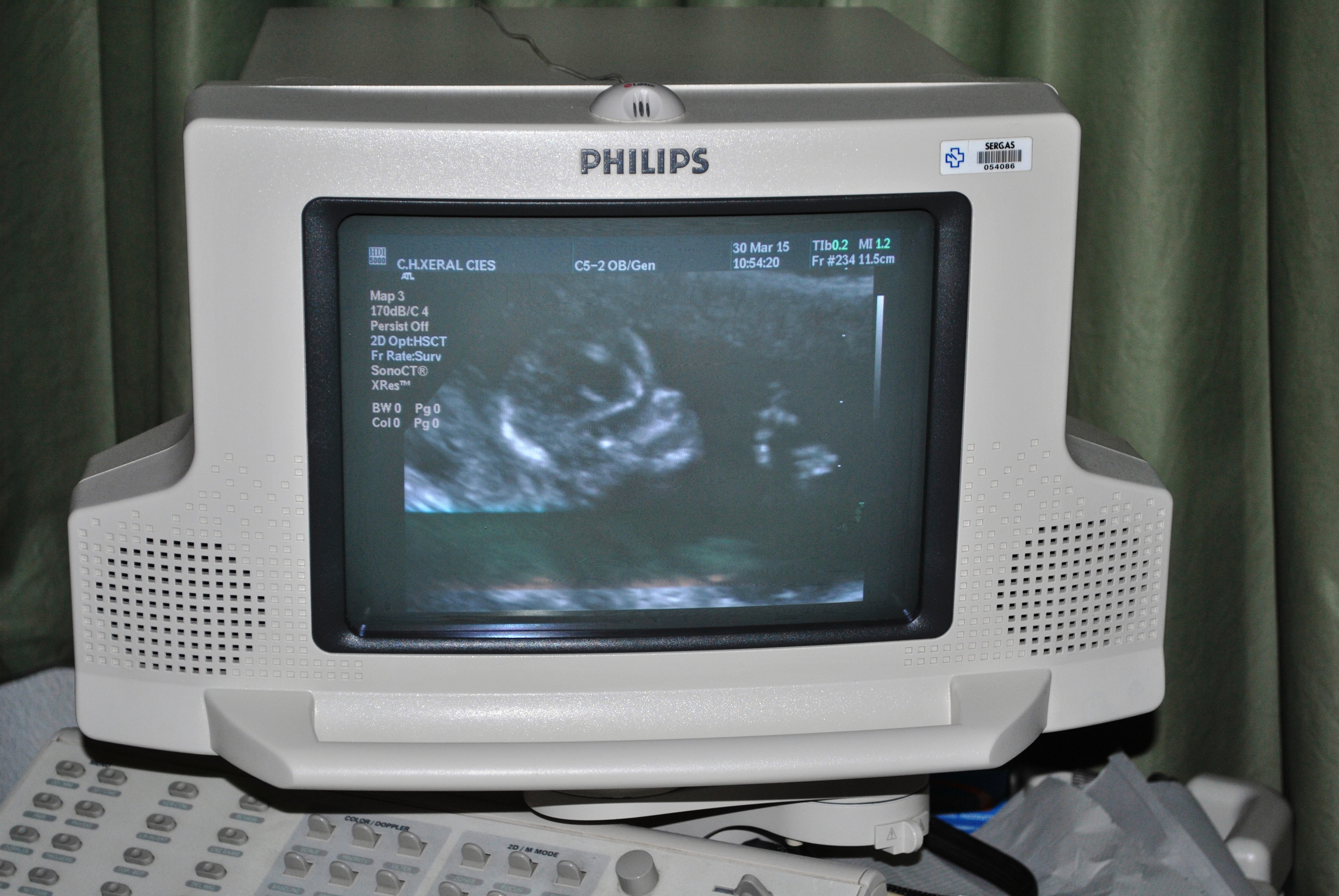 Ecógrafo, Centro de especialidades Coia